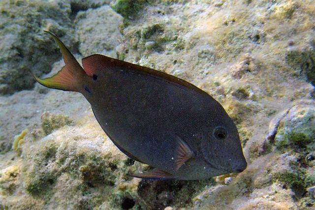 Pez cirujano Acanthurus nigrofuscus, Egipto